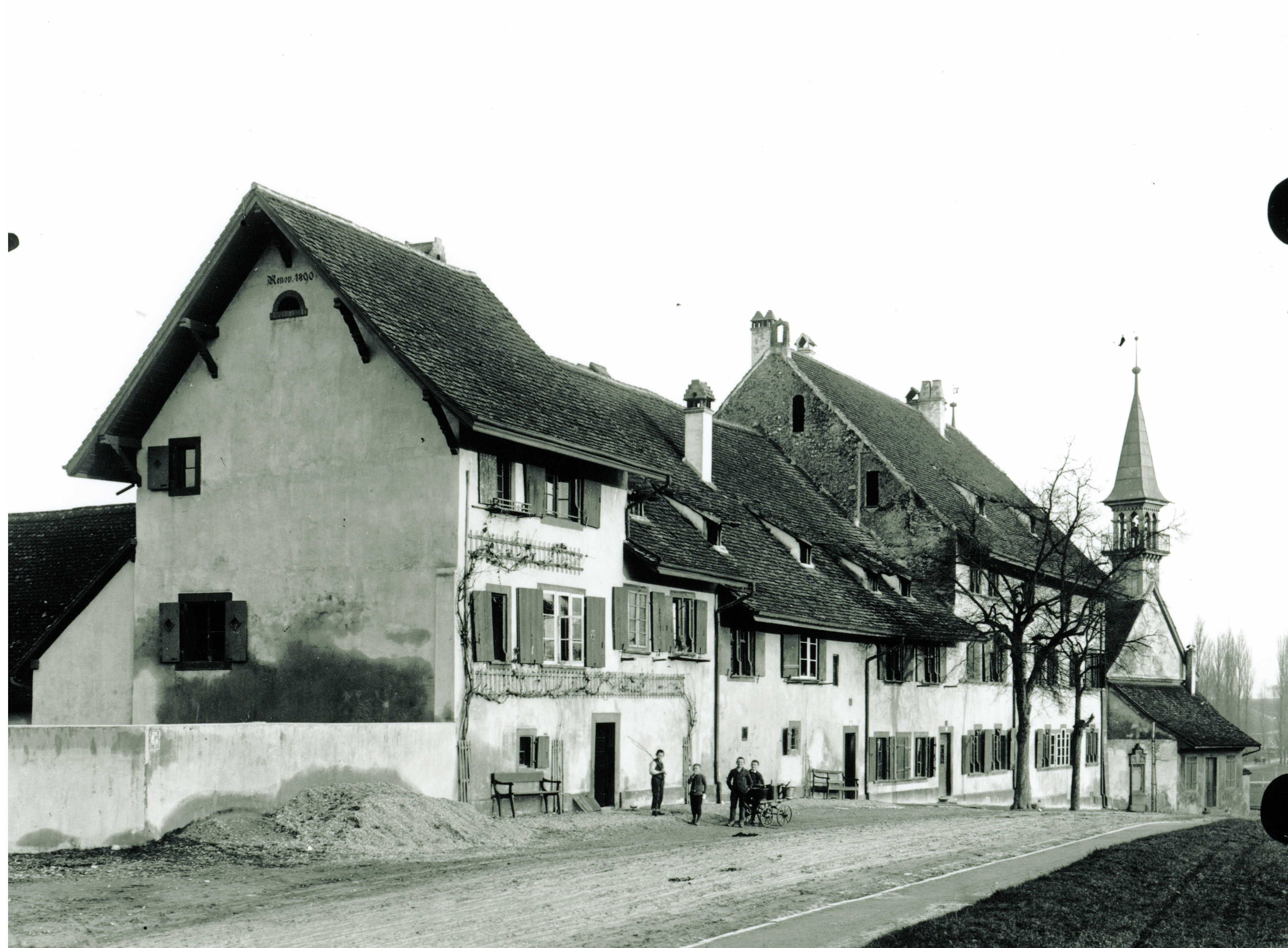 Die Siechenhäuser bei St. Jakob an der Birs, Blick von der Strassenseite, 1894. Ganz rechts die St. Jakobskirche.